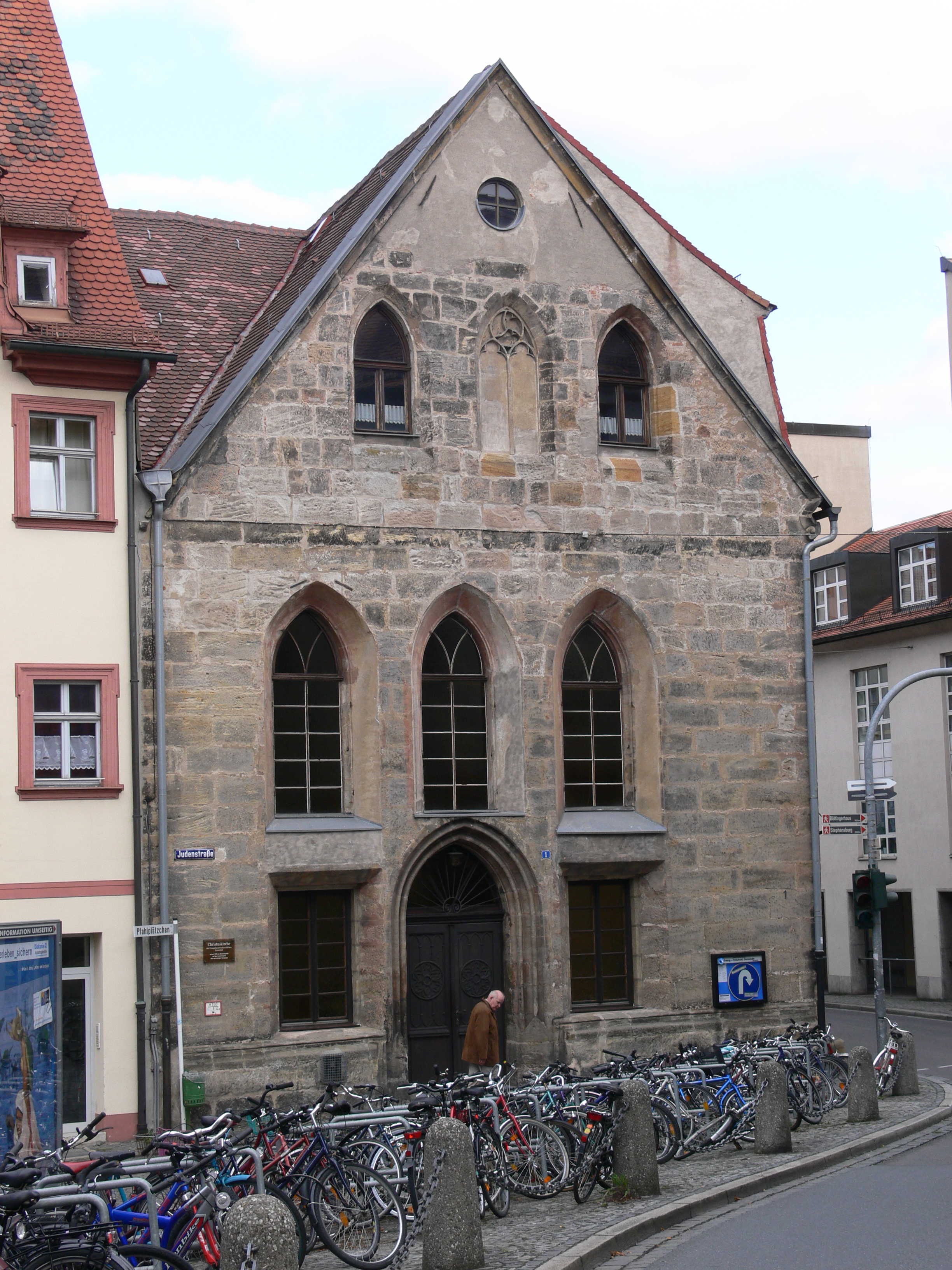 Ehemalige Christuskirche der Evangelisch-Freikirchlichen Gemeinde, Judenstraße 1 (am Pfahlplätzchen), Bamberg; erbaut 1470 als Marienkapelle auf den Grundmauern einer ehemaligen Synagoge